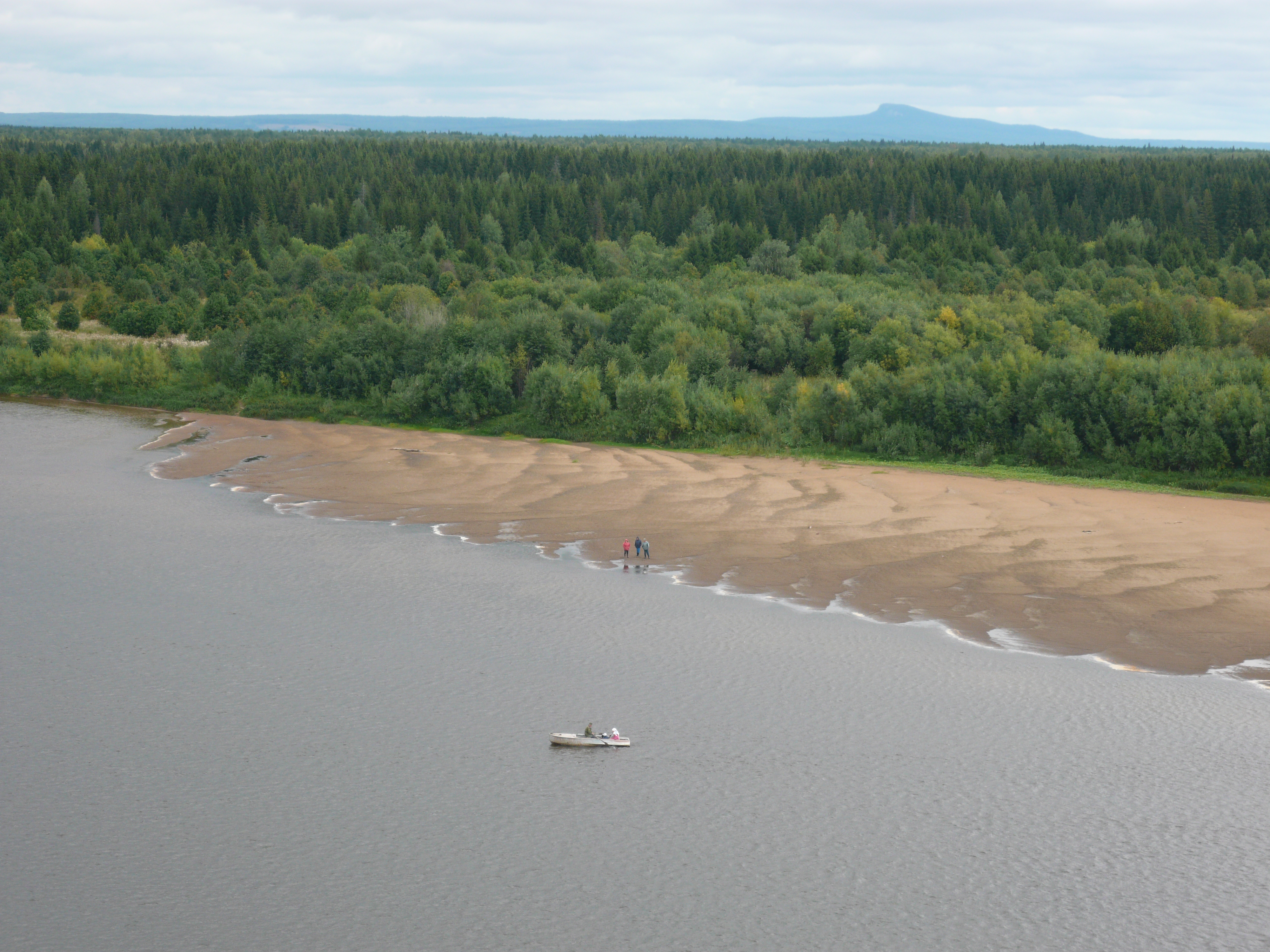 Река Колва возле Чердыни.